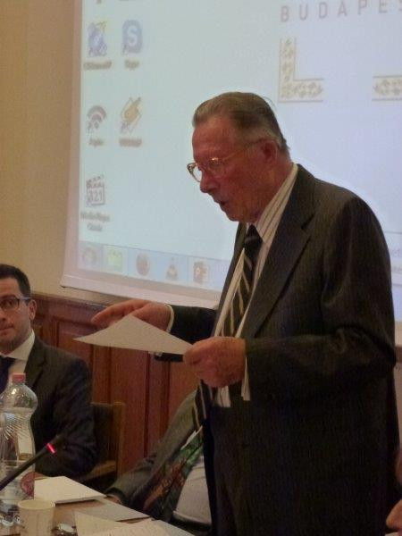 Hollai Imre (Újpest, 1925. június 22. – Budapest, 2017. november 22.[1]) magyar kommunista diplomata, hírszerző tiszt, majd külügyminiszter-helyettes, az ENSZ Közgyűlés elnöke az 1982-83-as ülésszak idején. Ez utóbbi posztot mindeddig (2017) egyetlen magyar diplomataként tölthette be.